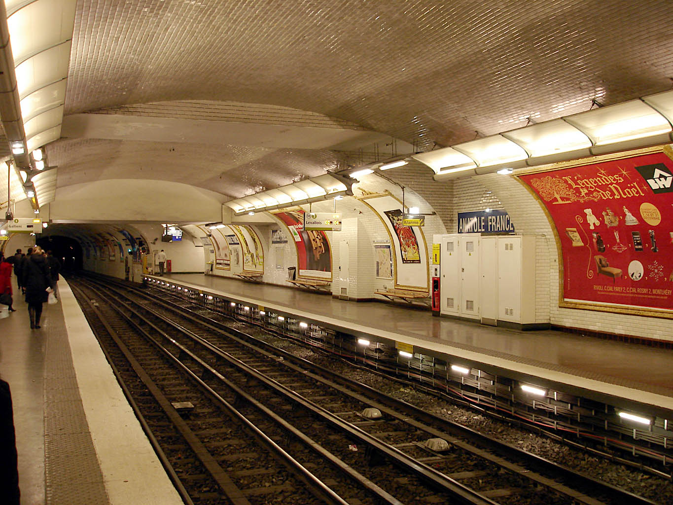 Station Anatole France de la ligne 3 du métro de Paris, France.